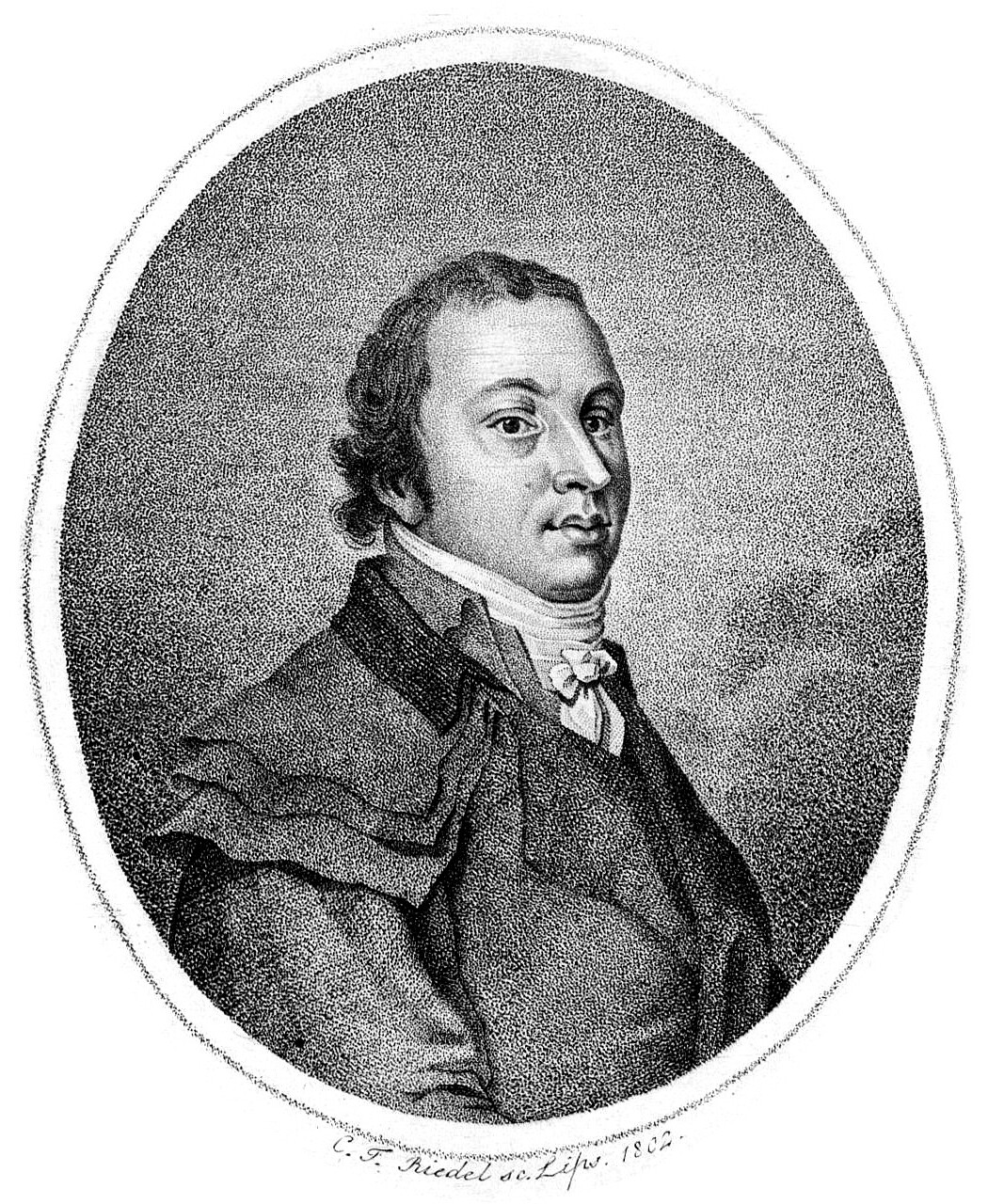 Depicted person: Peter Hänsel